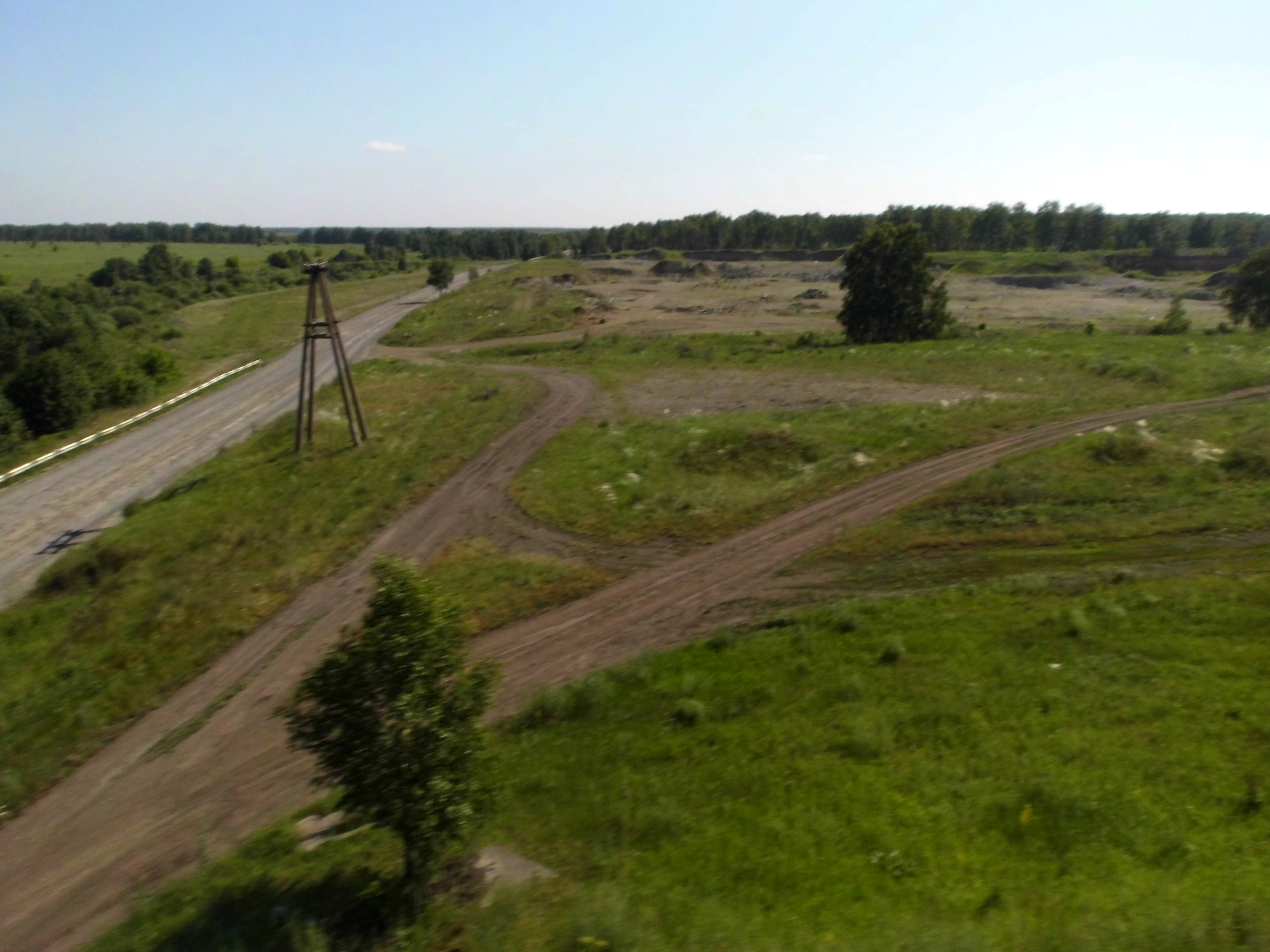 Бывшее село Муслюмово (Кунашакский район). Следы снятия верхнего слоя радиоактивного грунта на месте строений села Муслюмово на правом берегу реки Теча южнее железнодорожного моста через реку. Вид от железнодорожной линии в восточном направлении. Вдоль правого берега проходит автодорога 75К-206 "Железнодородная станция Муслюмово - Саккулово - Подъезд к Екатеринбургу атодороги М5 "Урал"", вправо от неё отходят грунтовые дороги в посёлок Муслюмово".